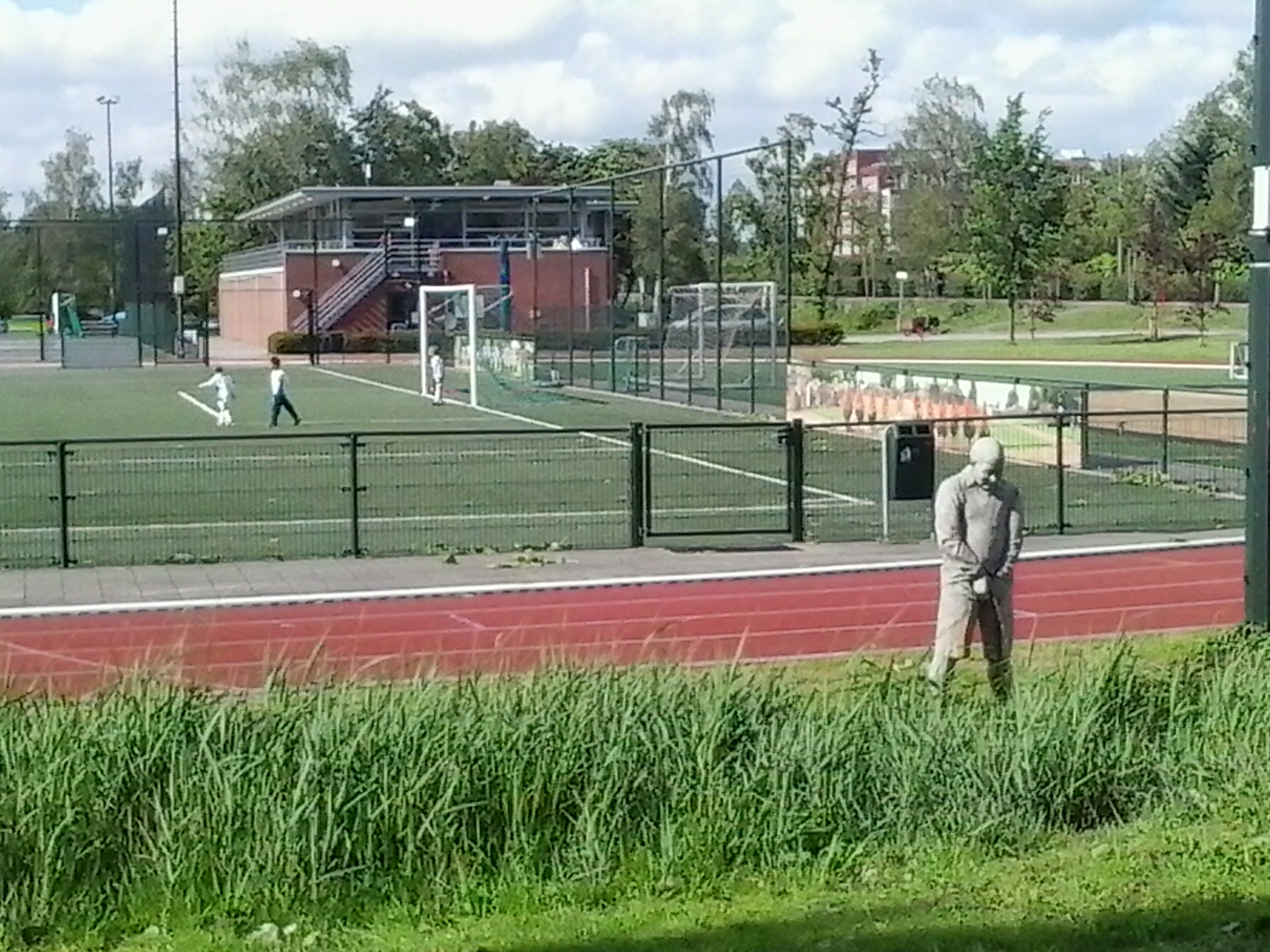 De wildplasser, beeld van Erik Kessels